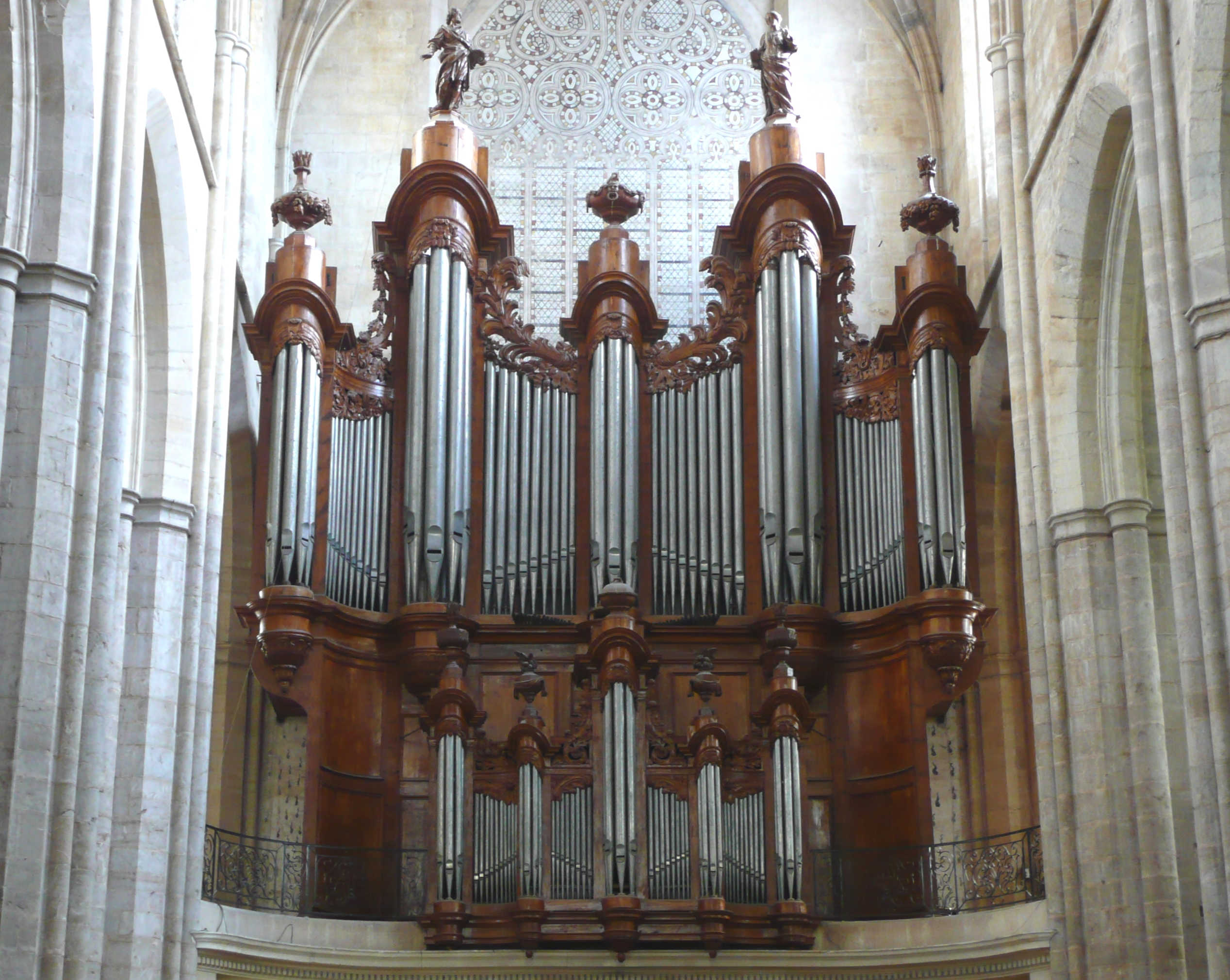 le chef d’œuvre de Jean-Esprit Isnard aidé de son neveu Joseph terminé en 1774,un des trop rares grands instruments authentiques de cette époque (avec le François-Henri Clicquot de la cathédrale de Poitiers)